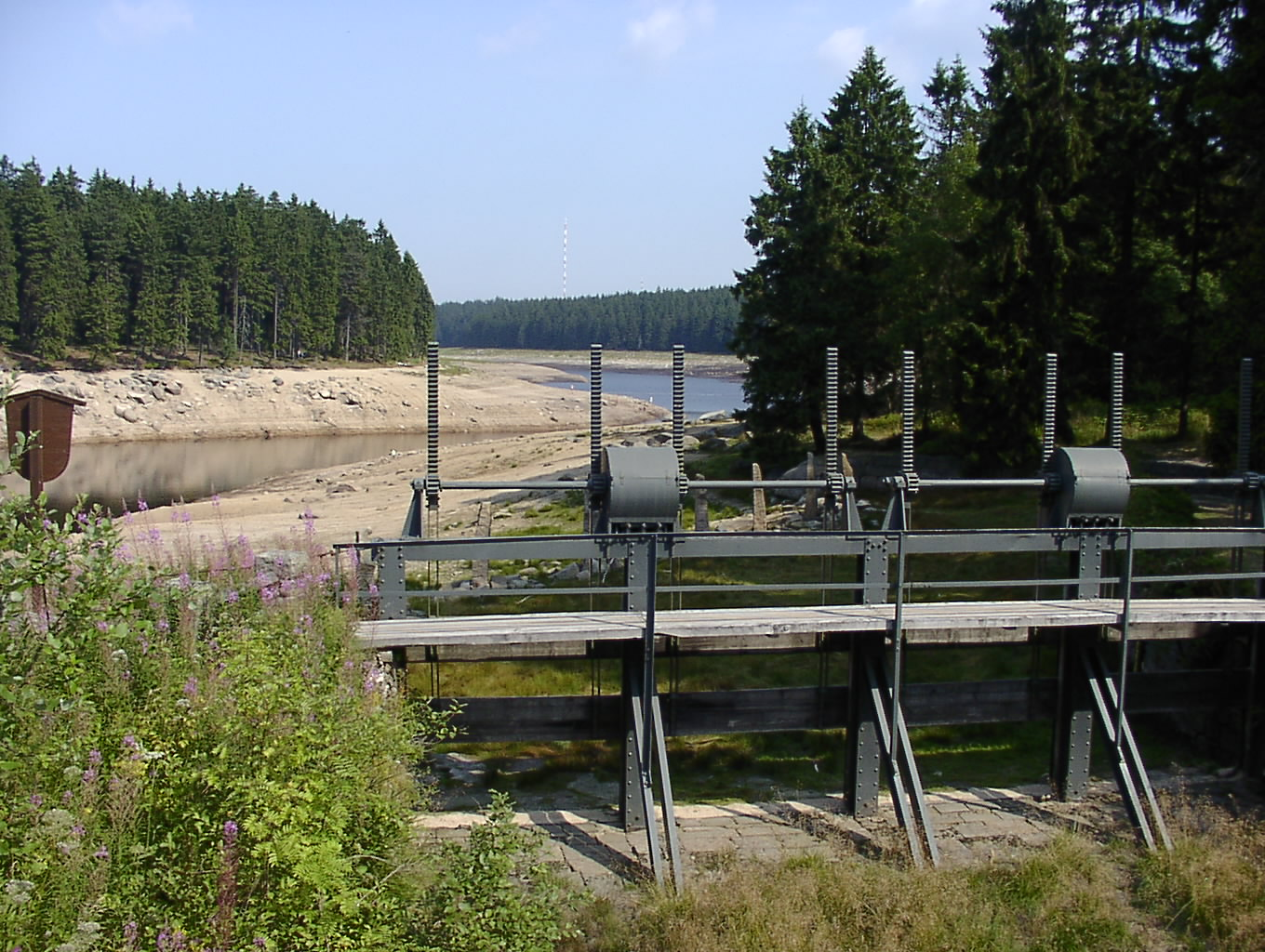 Oderteich: Blick über die Hochwasserentlastung mit Schützanlage von 1895 auf den weitgehend entleerten Stauraum des Oderteiches